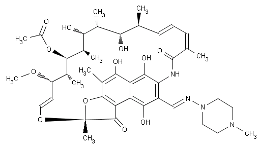 Strukturformel von Rifampicin